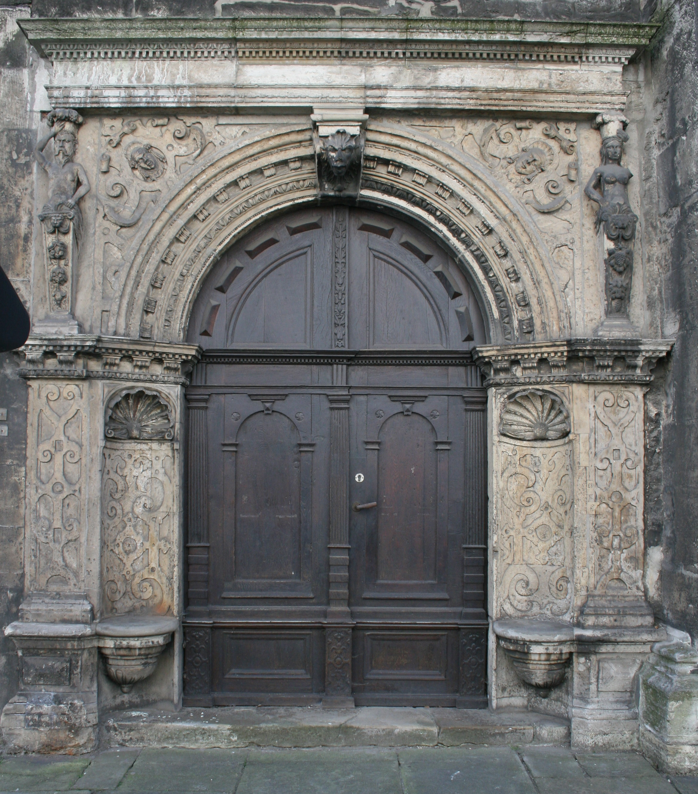 Portal an der Nordseite der Brüdernkirche, vermutlich für Heinrich Bühring angefertigt. Angefertigt von Balthasar Kircher